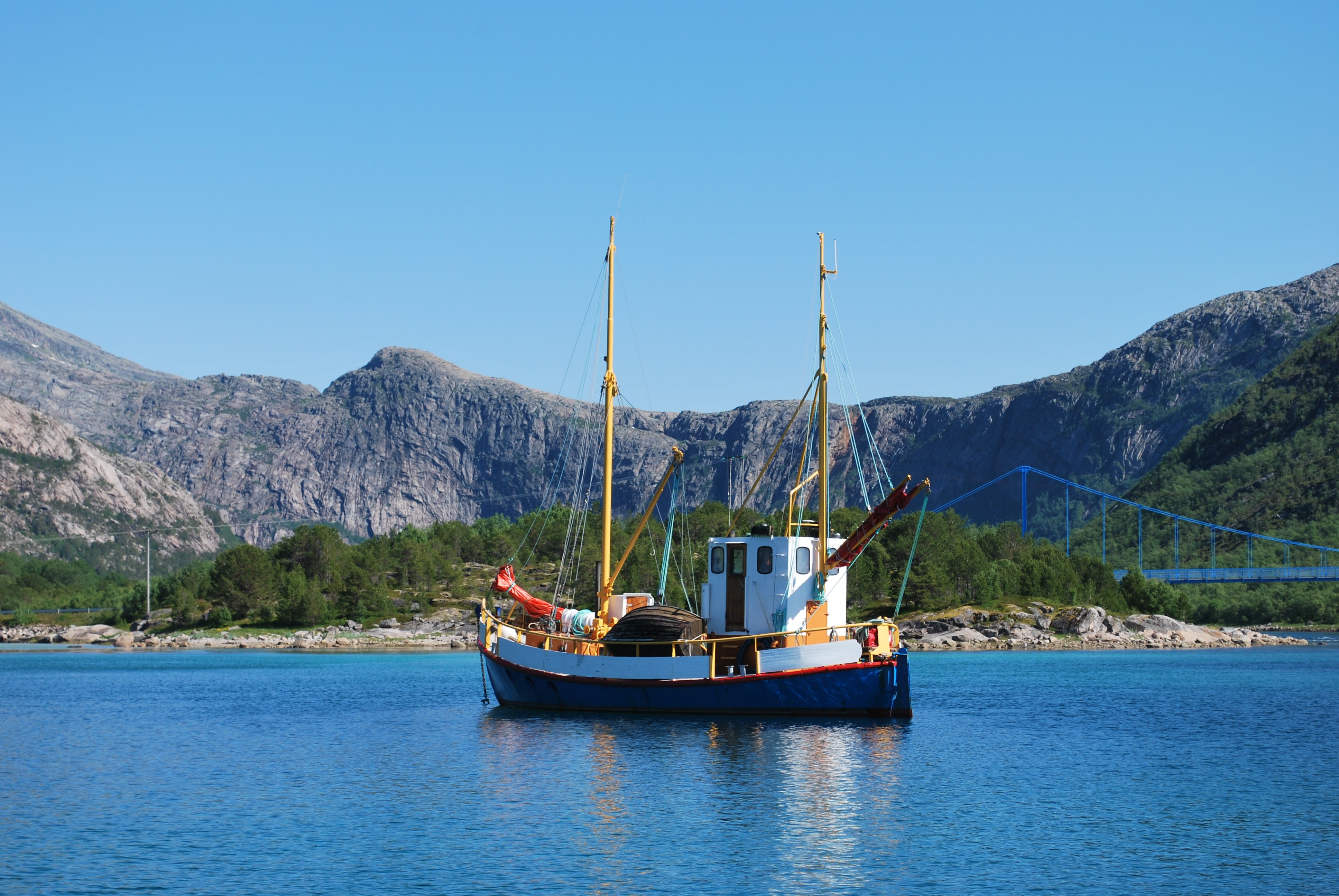 Kjerfjorden som går fra Tjeldsundet inn i Tjeldøya. Kjerfjordbrua (blå) sees til høyre.